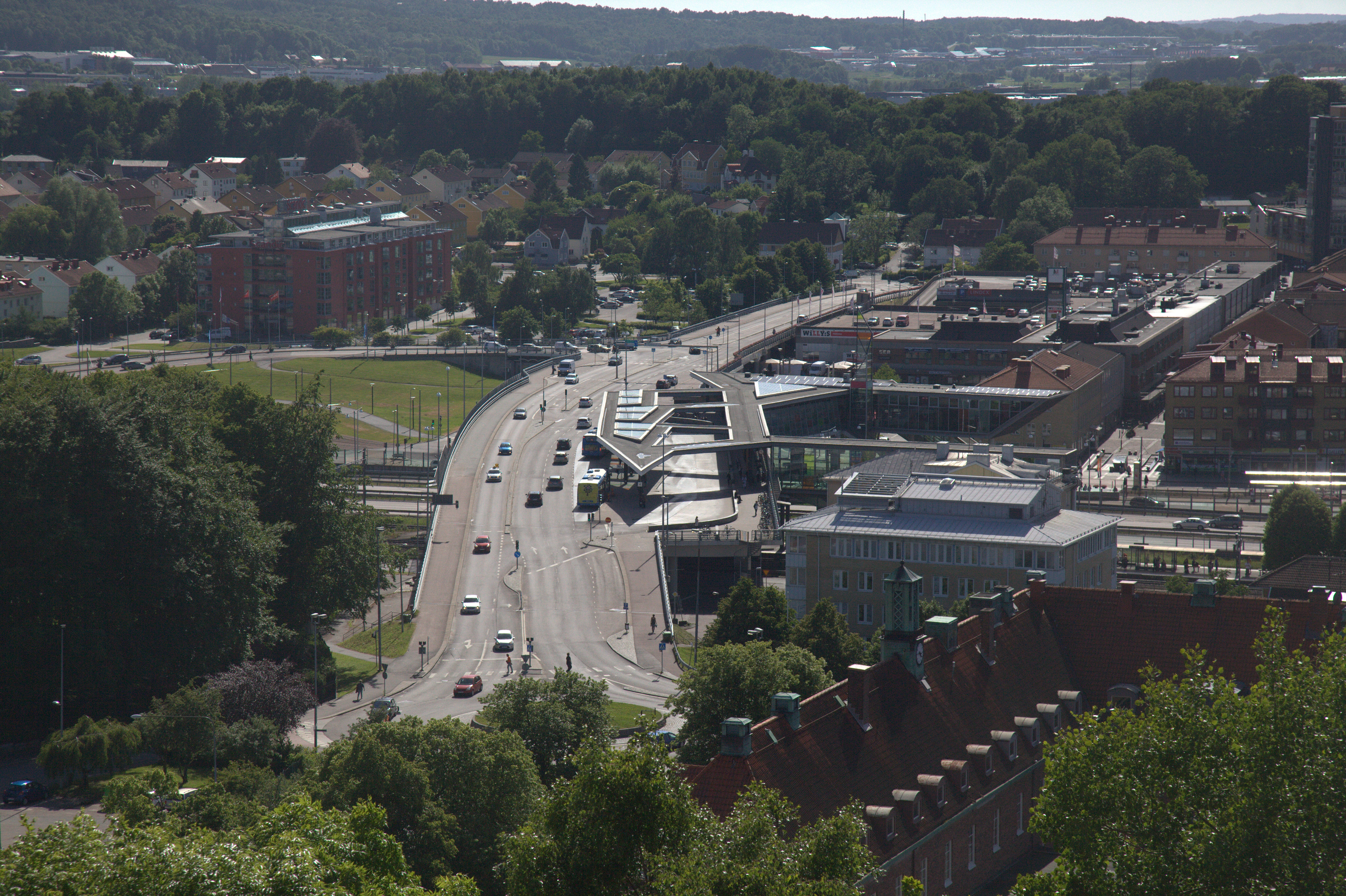 Utsikt över mölndals bro från Störtfjället